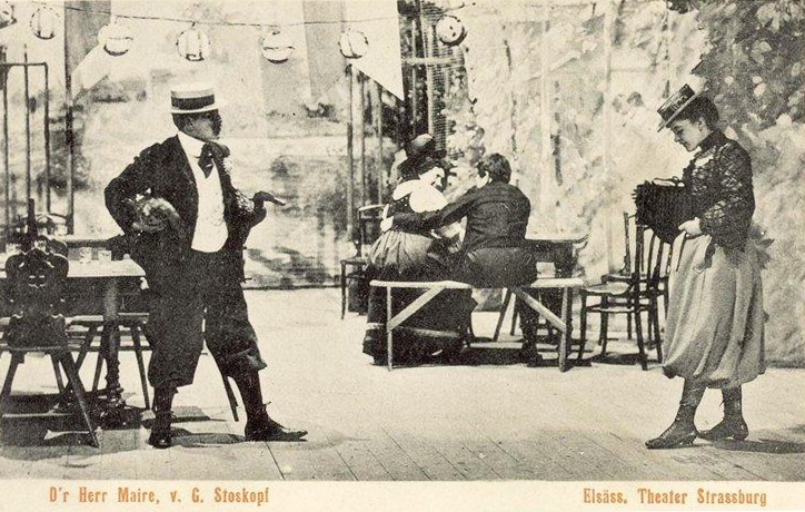 D'r Herr Maire, v. G. Stoskopf : Elsäss. Theater Strassburg. Éditeur : Jul. Manias (Strasbourg). 1908. Bibliothèque nationale et universitaire de Strasbourg